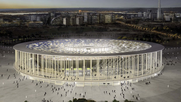 Imagem do projeto do Estádio Nacional de Brasília, após sua reforma.